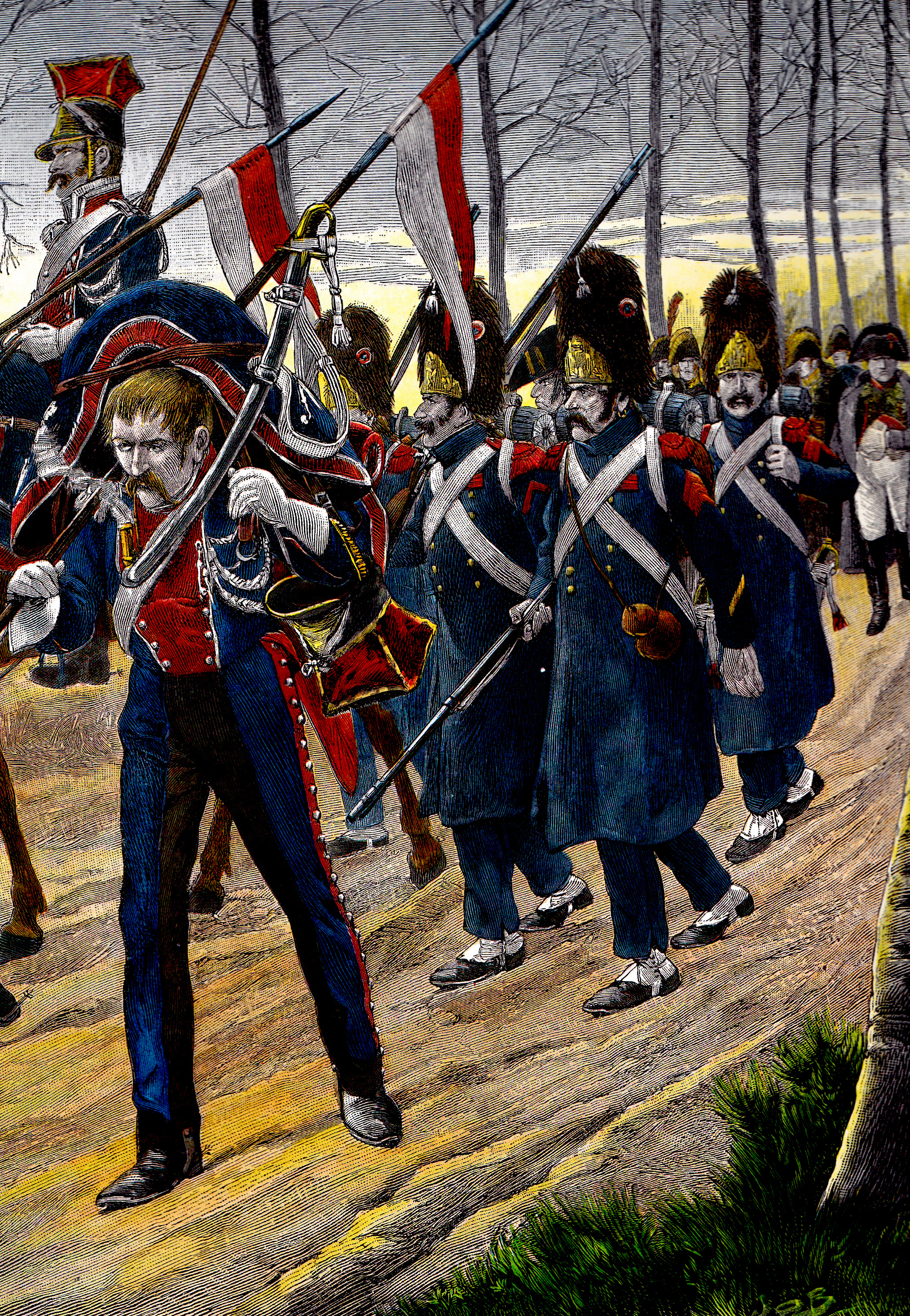 Retour de Napoléon Ier de l'île d'Elbe en avril 1815. On voit sur cette image les lanciers polonais de la Garde accompagné des grenadiers à pied du 1er régiment. Le lancier au premier plan n'a pas de monture et doit transporter sa selle, sa chabraque et son armement sur son dos.